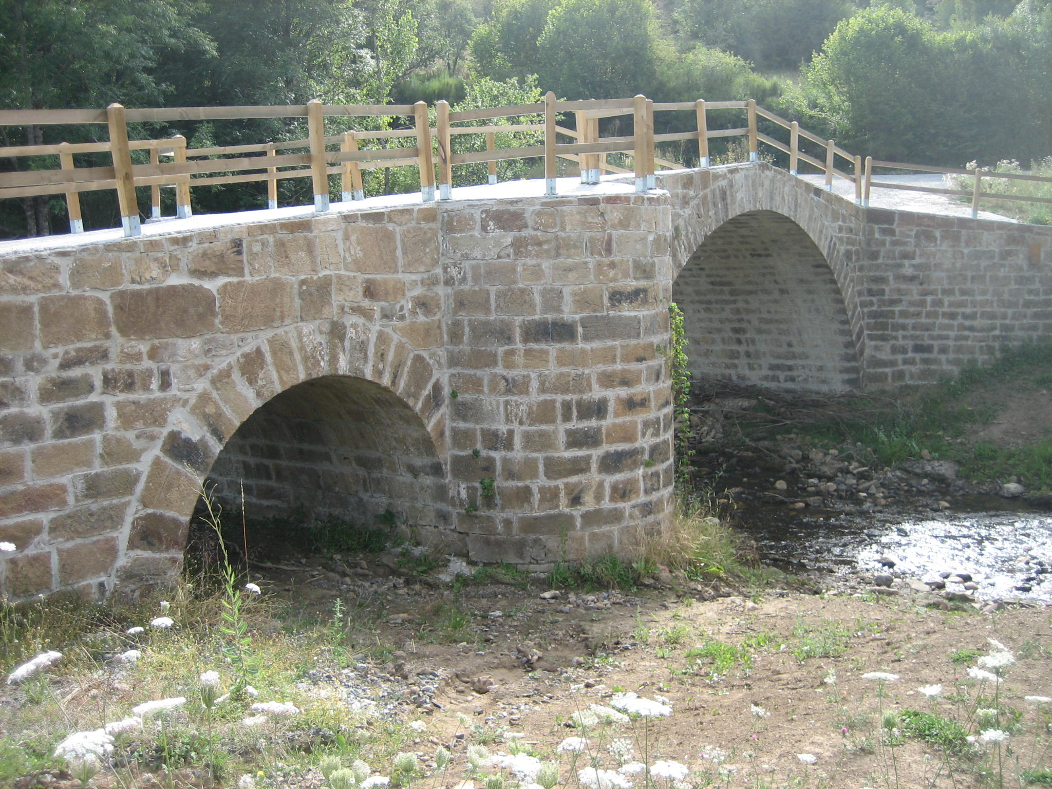 Puente romano de Villaescusa, Morgovejo (León).